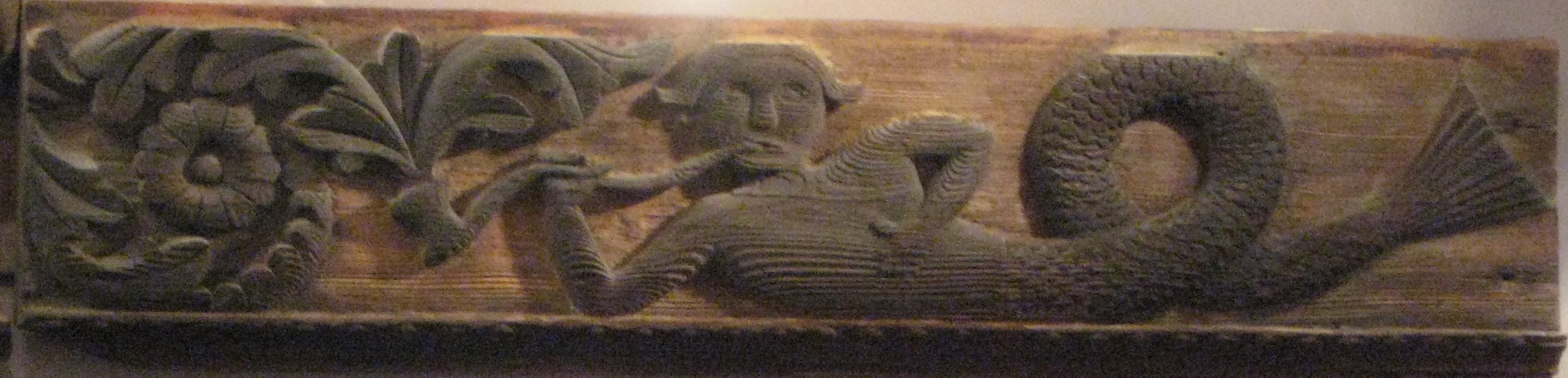 Фараонка. Выставка: «Кто что собирает. Иконы и редкости из коллекций Александра Липницкого и его друзей: Андрея Макаревича, Артемия Троицкого, Евгения Ройзмана» Музей древнерусской культуры и искусства им. А. Рублева, лето 2012